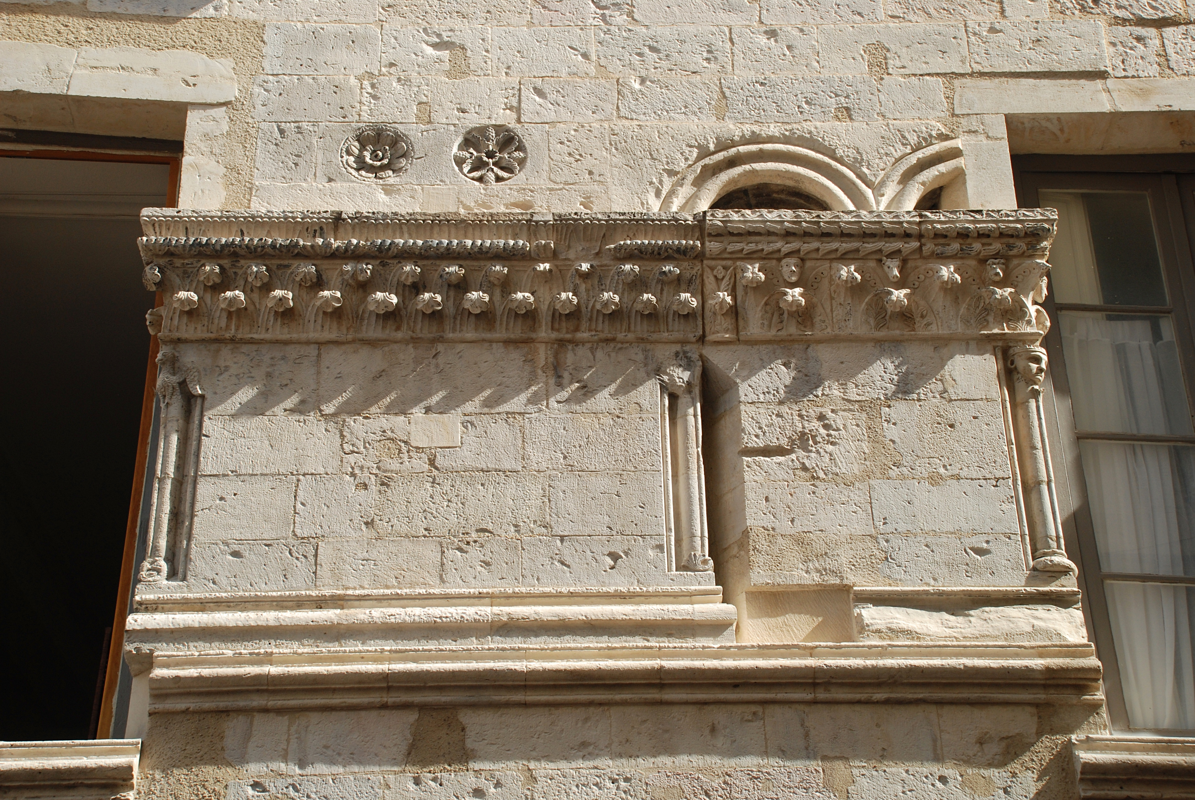 France - Provence - Maison romane de Nîmes